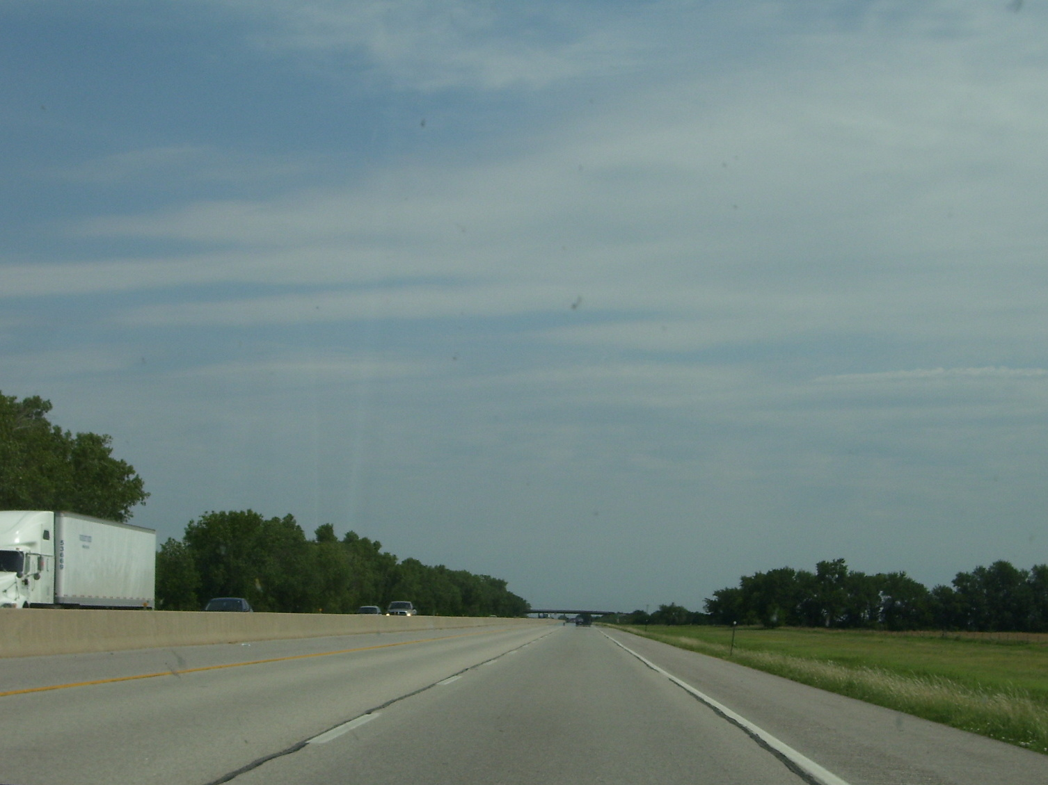 The Kansas Turnpike (Interstate 35) between Milemarkers 29 and 30.